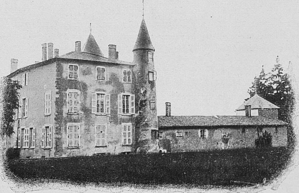 Dictionnaire illustré des communes du département du Rhône. Tome 1 / par MM. E. de Rolland et D. Clouzet.